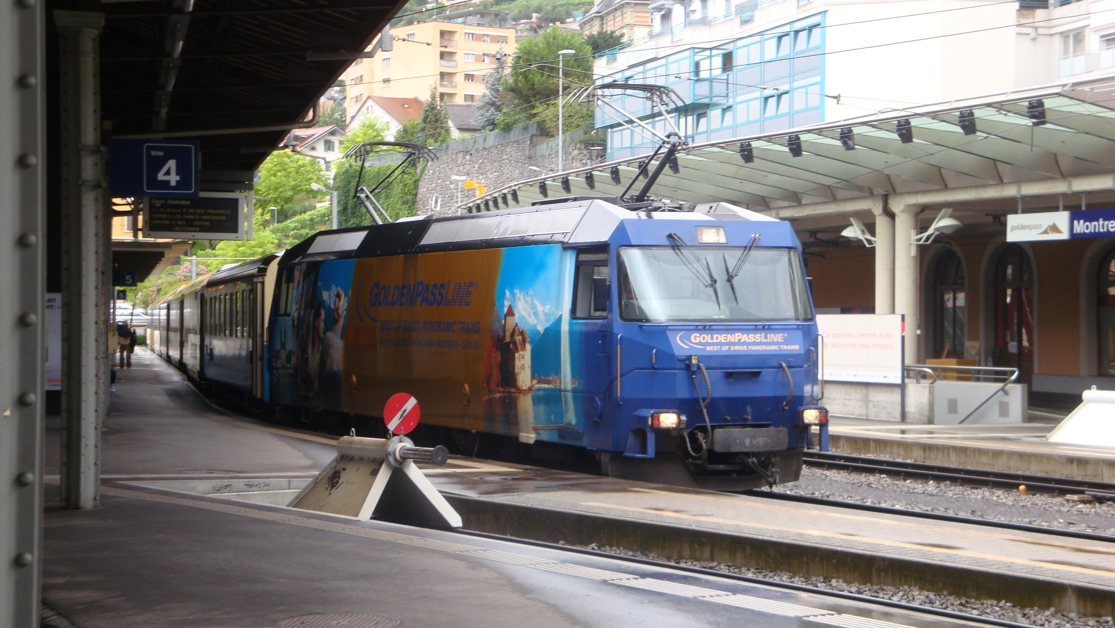 GoldenPassPanoramic im Bahnhof Montreux